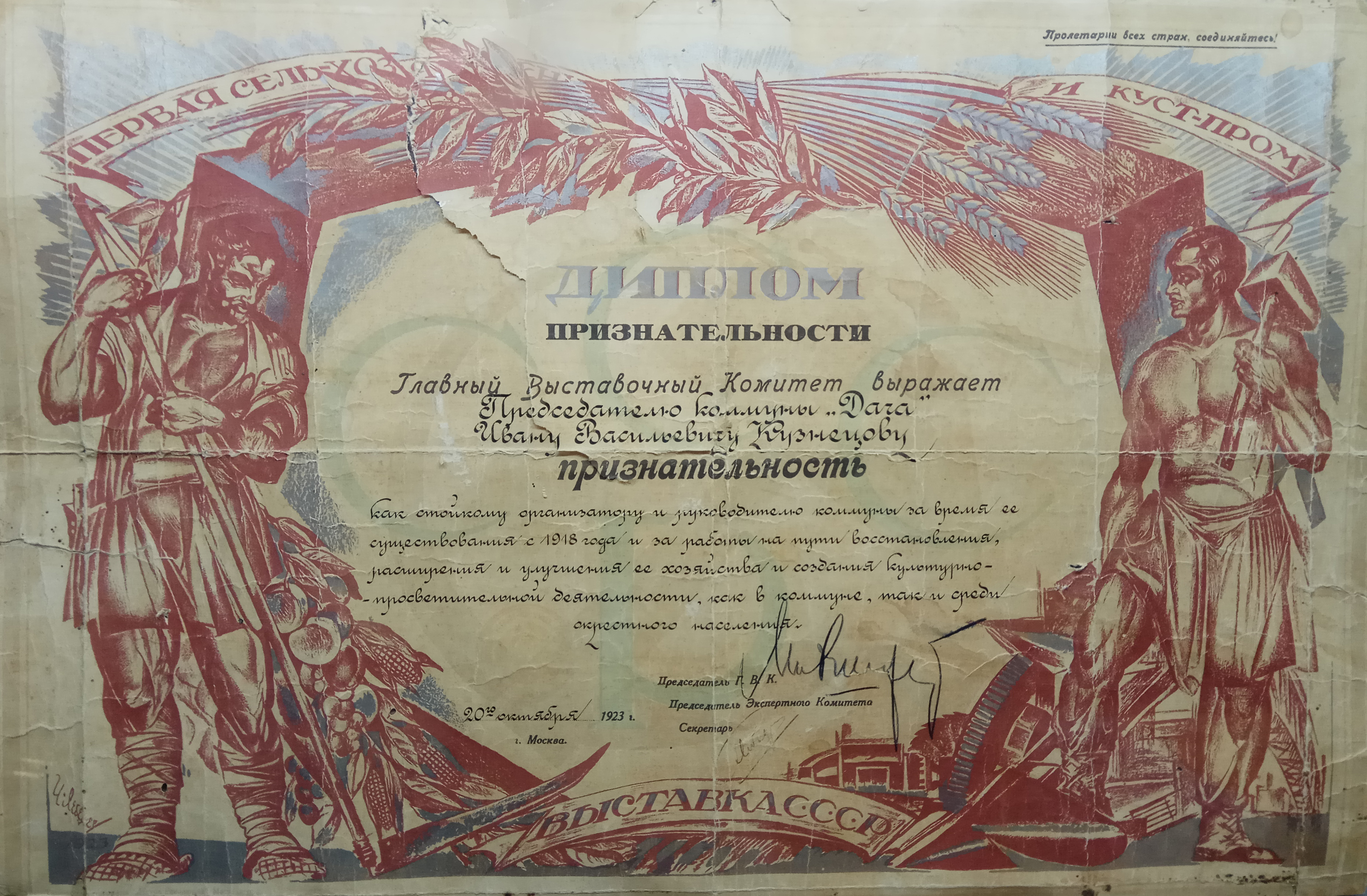 Диплом признательности первой всероссийской сельскохозяйственной и кустарно-промышленной выставки вручен И.В. Кузнецову, председателю комунны "Дача", село Новорусаново, Жердевский район, Тамбовская область.